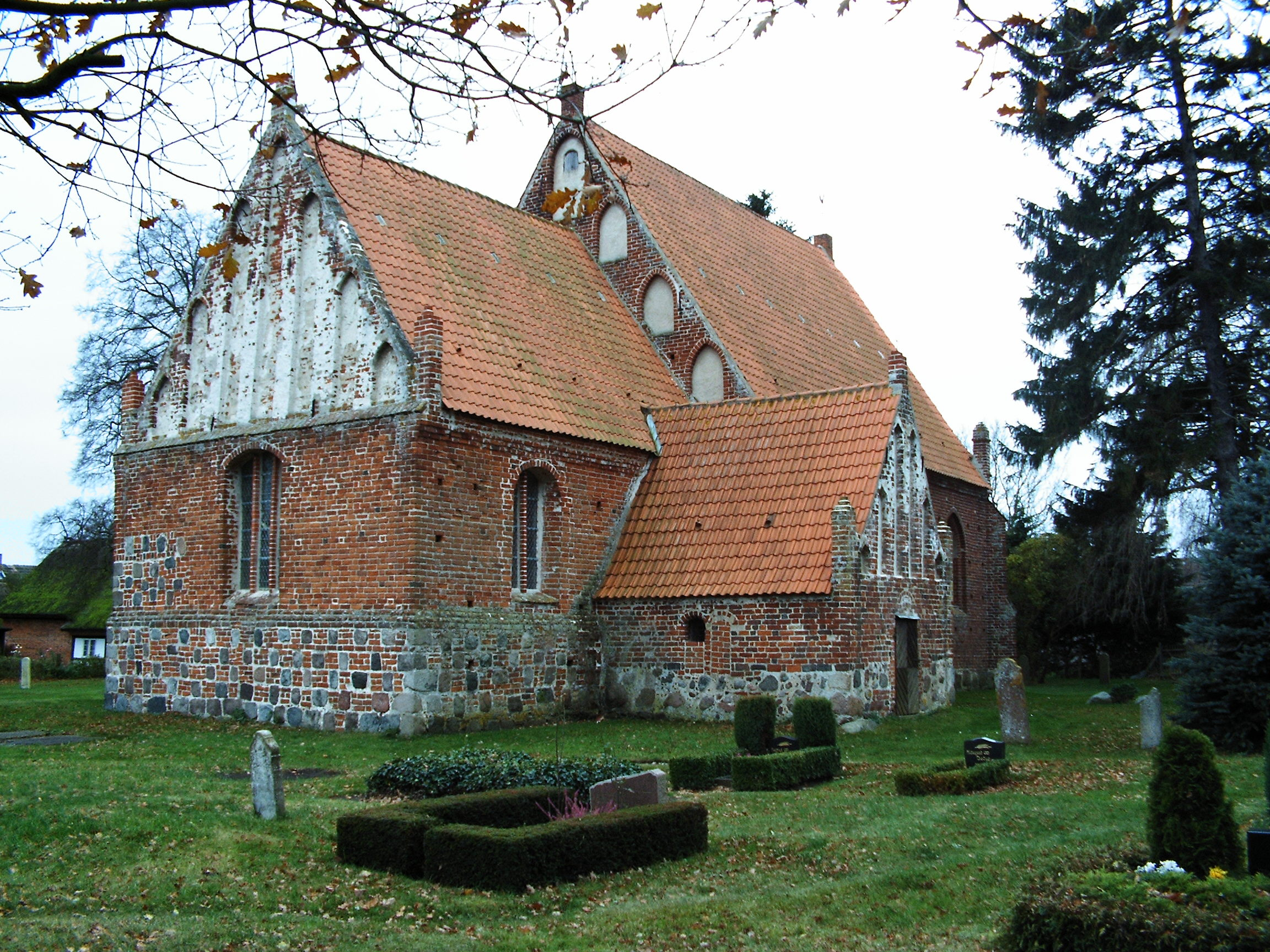 Privatfoto der Kirche von Rappin auf Rügen. Aufnahme vom November 2007. Aufgenommen vom Friedhof aus.